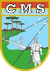 Brasão do Comando Militar do Sul